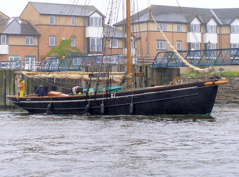 pilot cutter